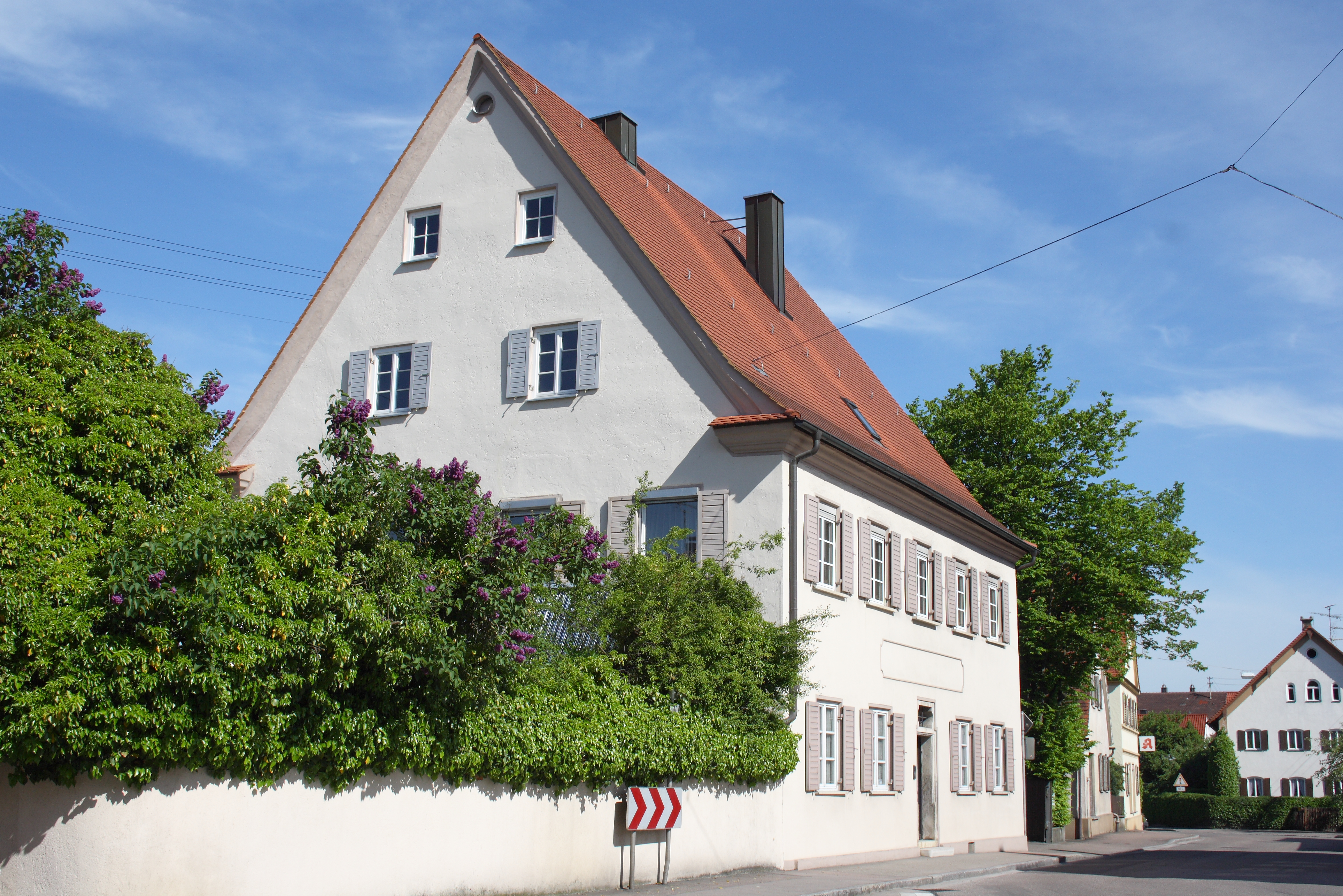 Ehemaliges Pfarrhaus am Marienplatz 4 in Wittislingen im Landkreis Dillingen an der Donau (Bayern), von 1732